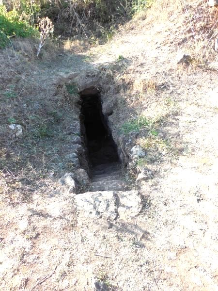 In stretta relazione col vicino nuraghe di Santa Sabina e col villaggio circostante - le cui tracce sono individuabili con difficoltà - il Pozzo sacro di Cherchizzu aspetta ancora di essere riportato alla luce in tutte le sue parti.